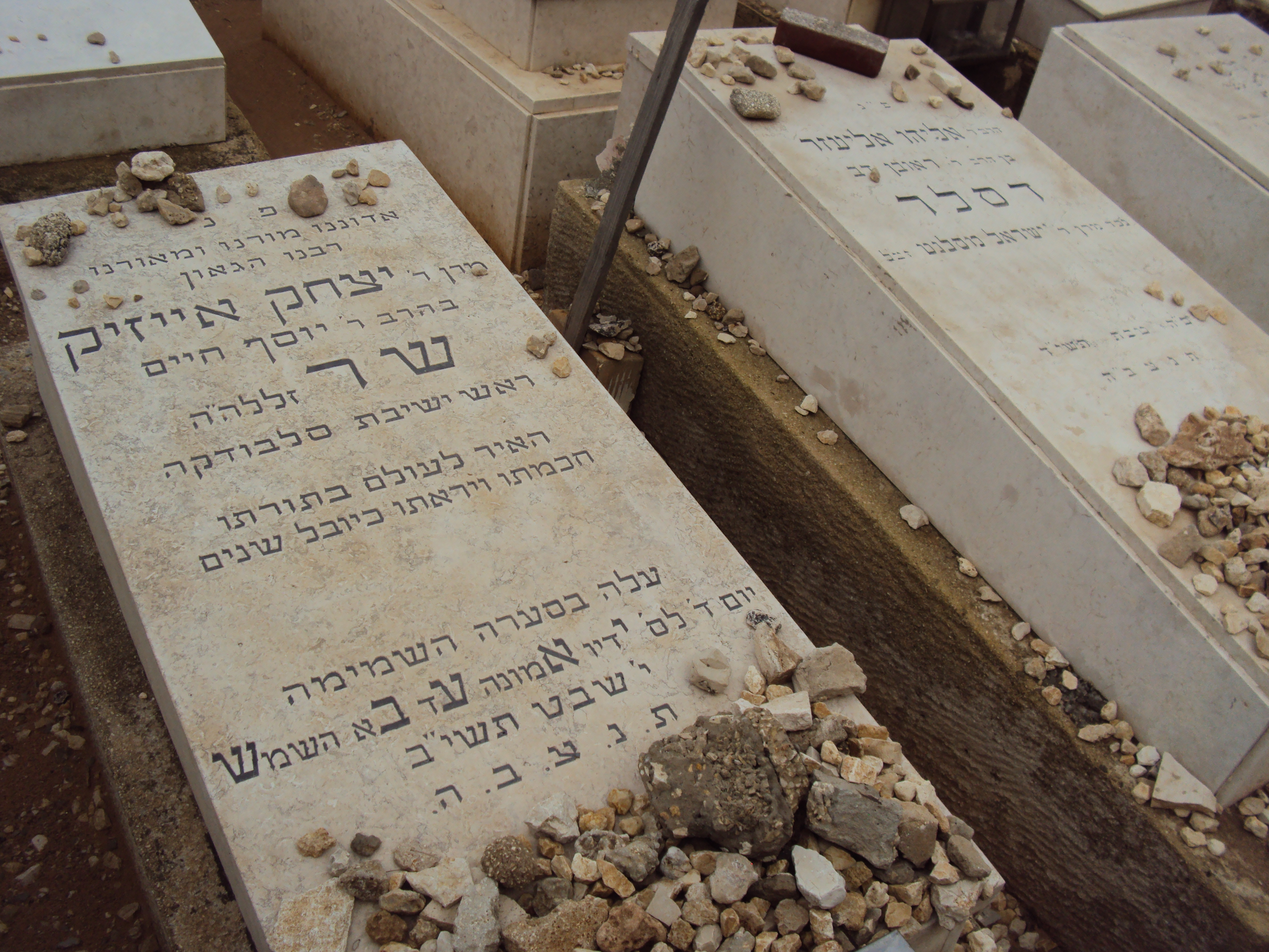 בית הקברות שומרי שבת, זכרון מאיר, בני ברק